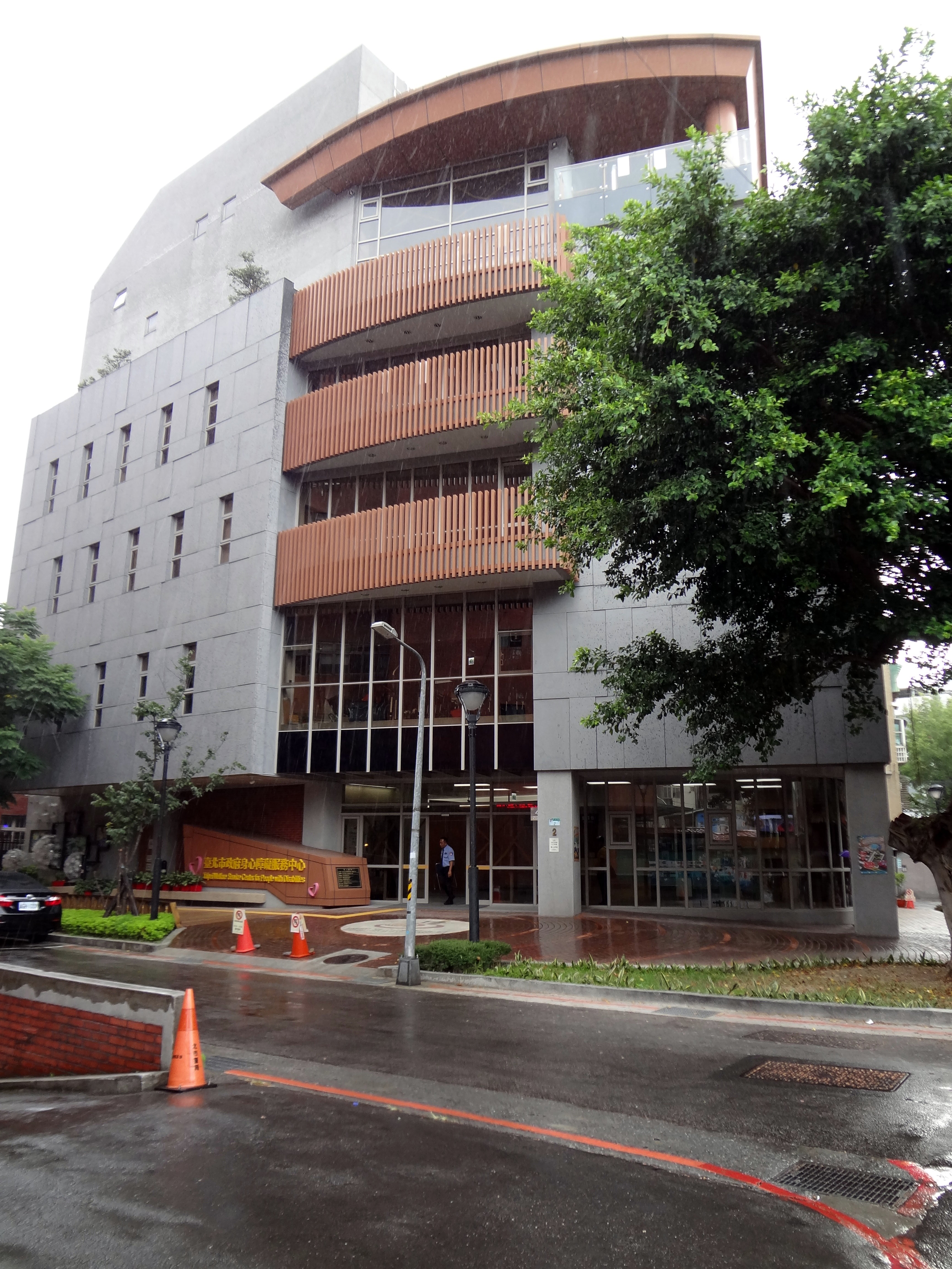 臺北市政府身心障礙服務中心，位於臺北市中山區長安西路5巷2號。